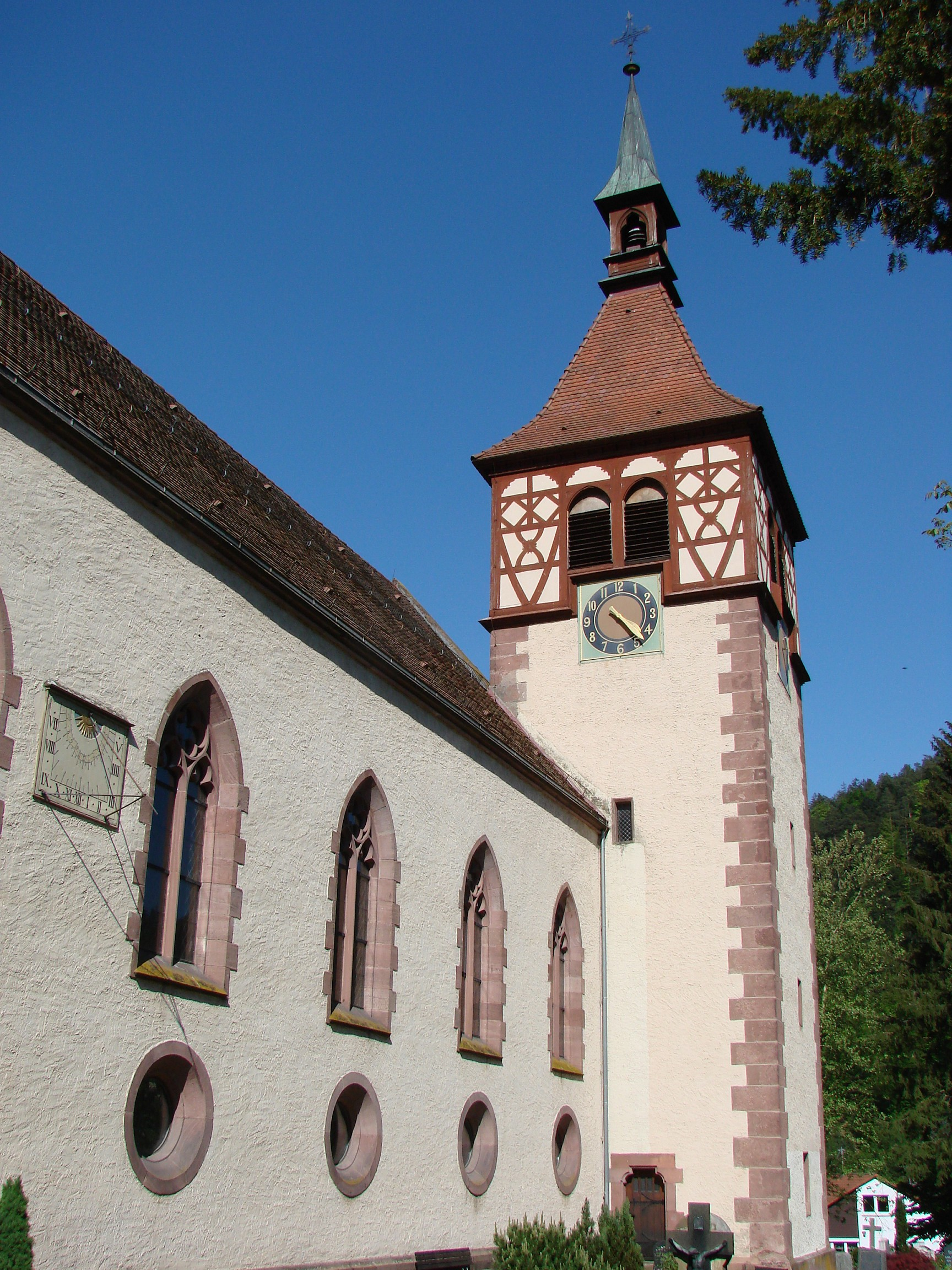 Bad Liebenzell, St. Blasius church